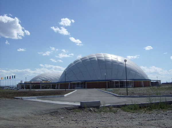 Стадион "Субедей" в Кызыле Google Maps link